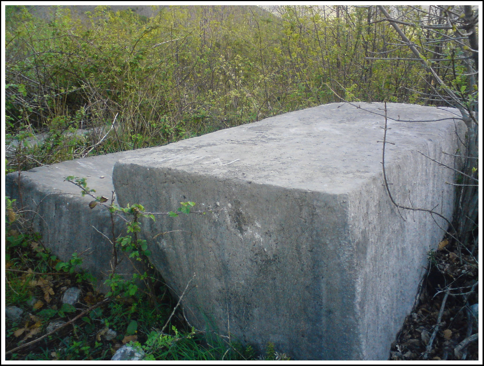 Stecak - Kuti